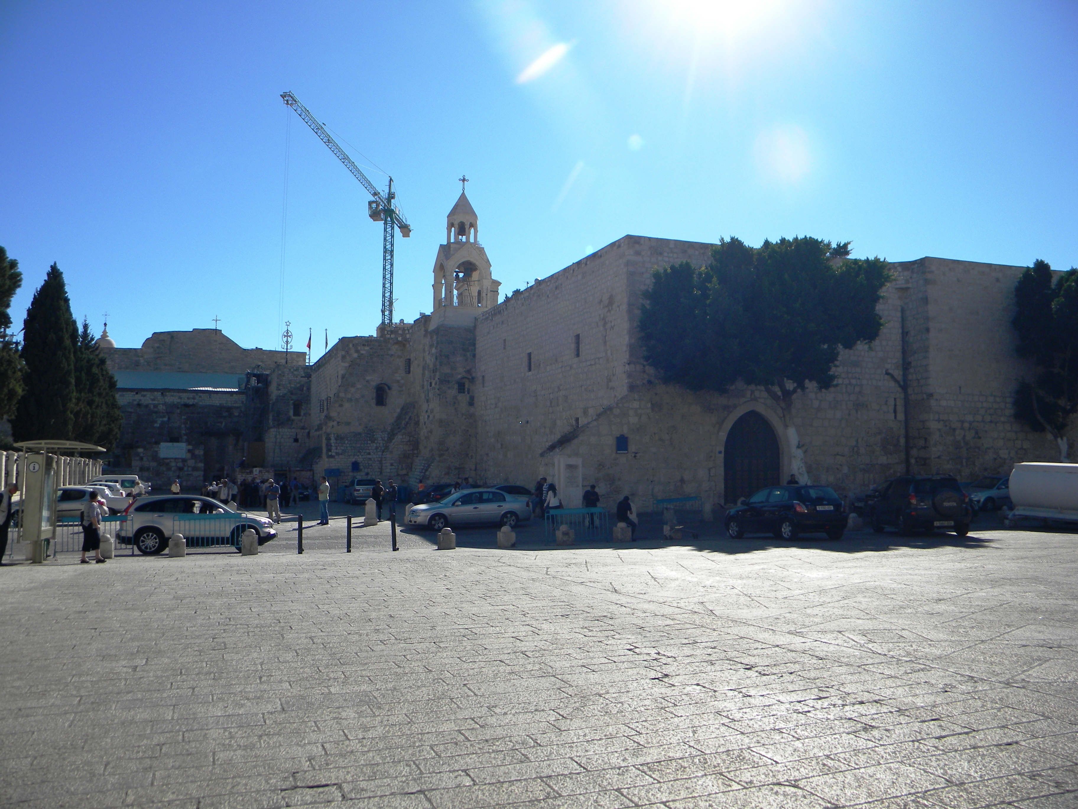 Manger Square